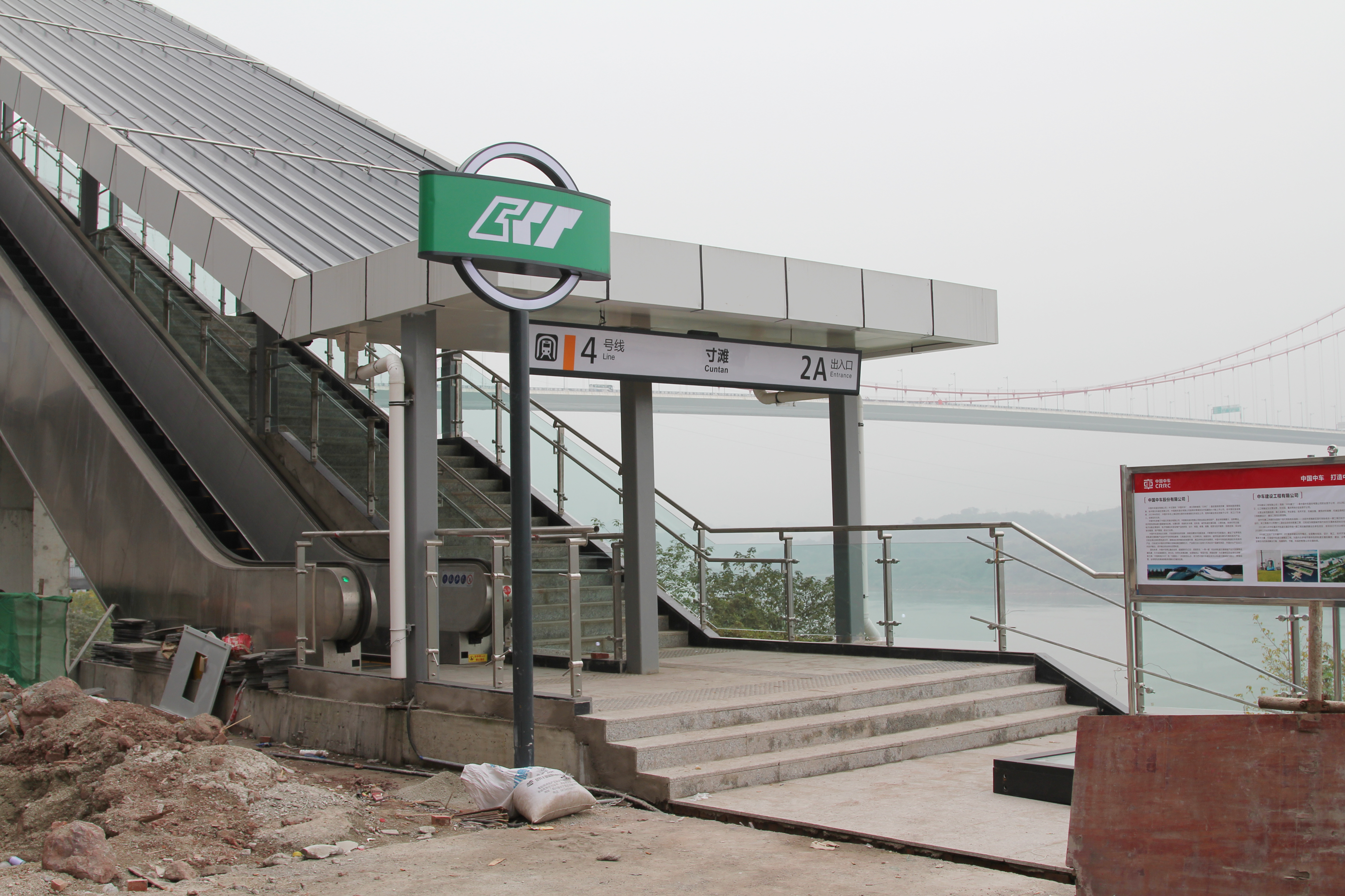 4号线寸滩站2A出口